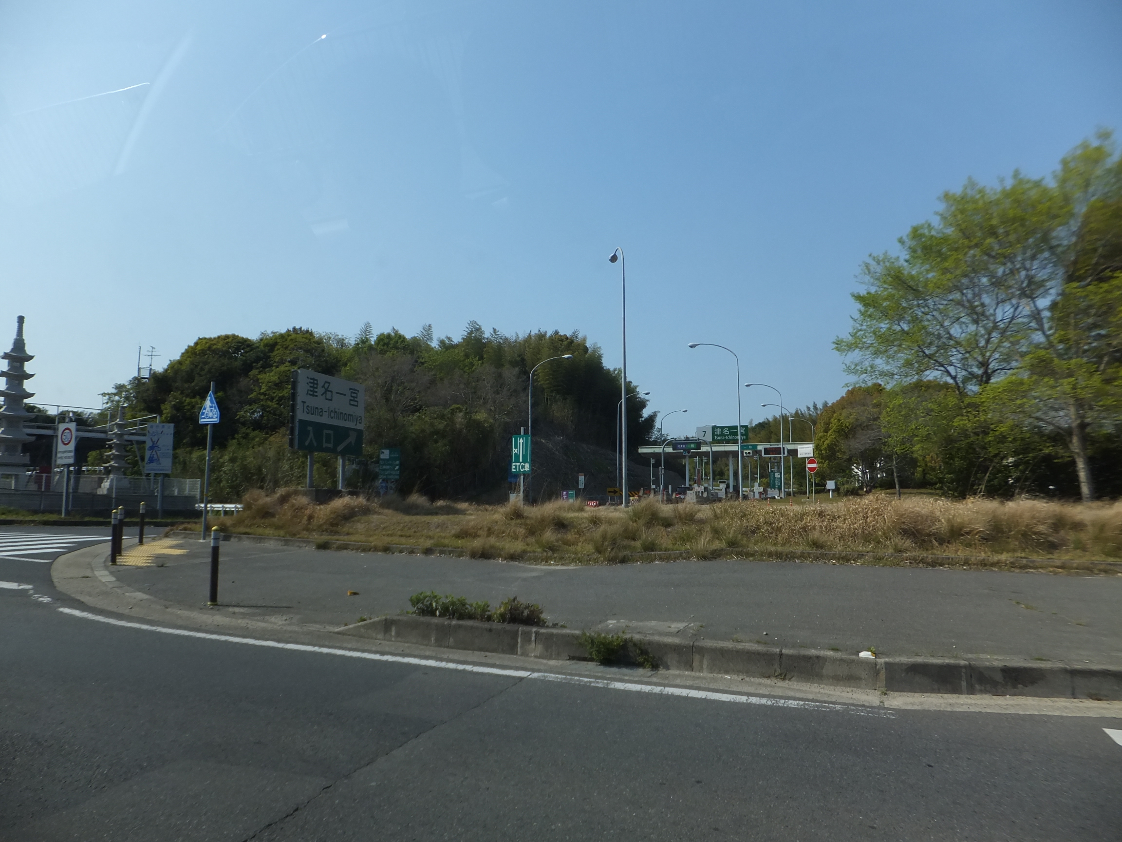 津名一宮インターチェンジ（2013年4月27日撮影）